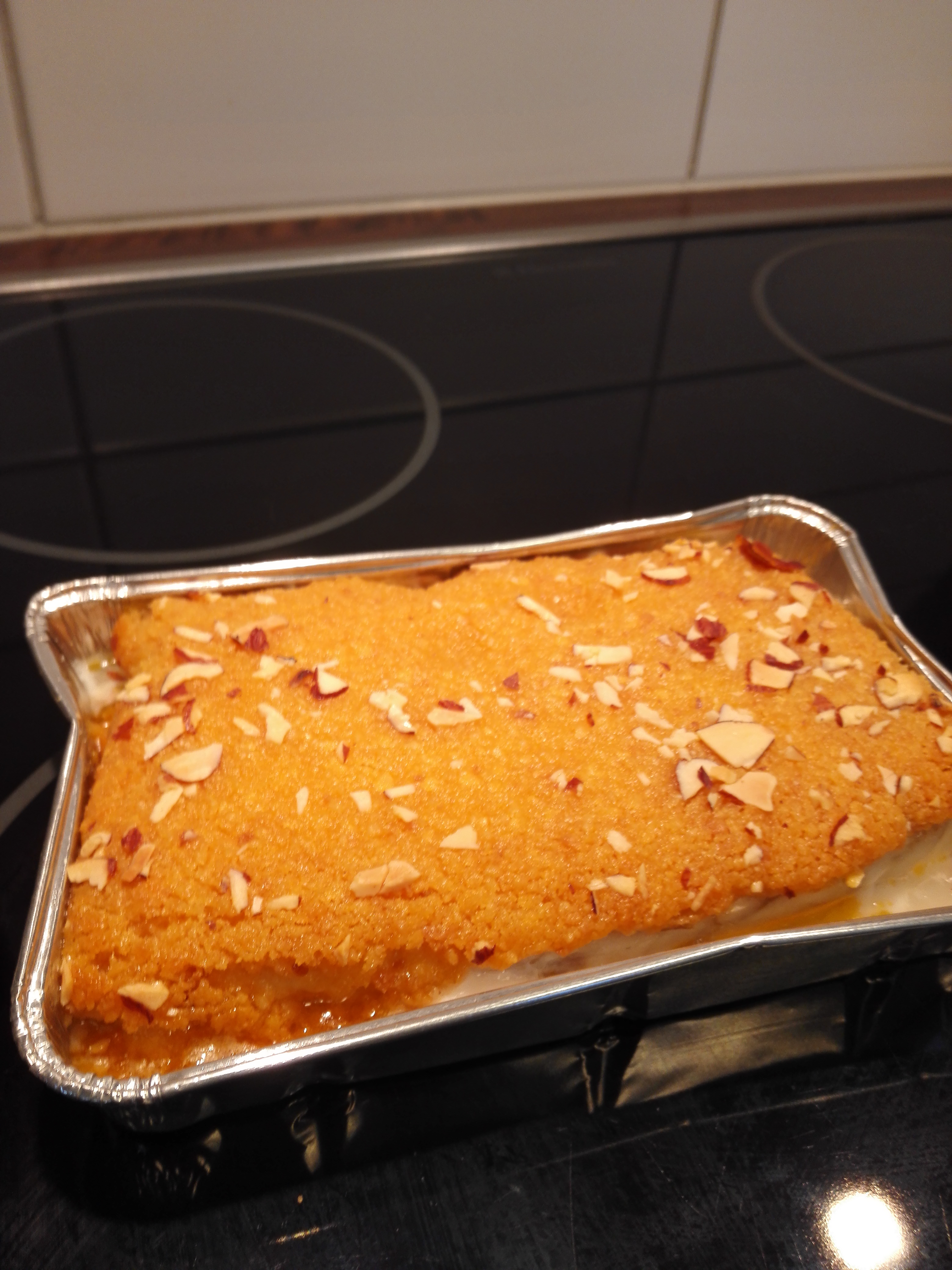 Mantelikala valmisruoka. Kala on Alaskanseitiä.